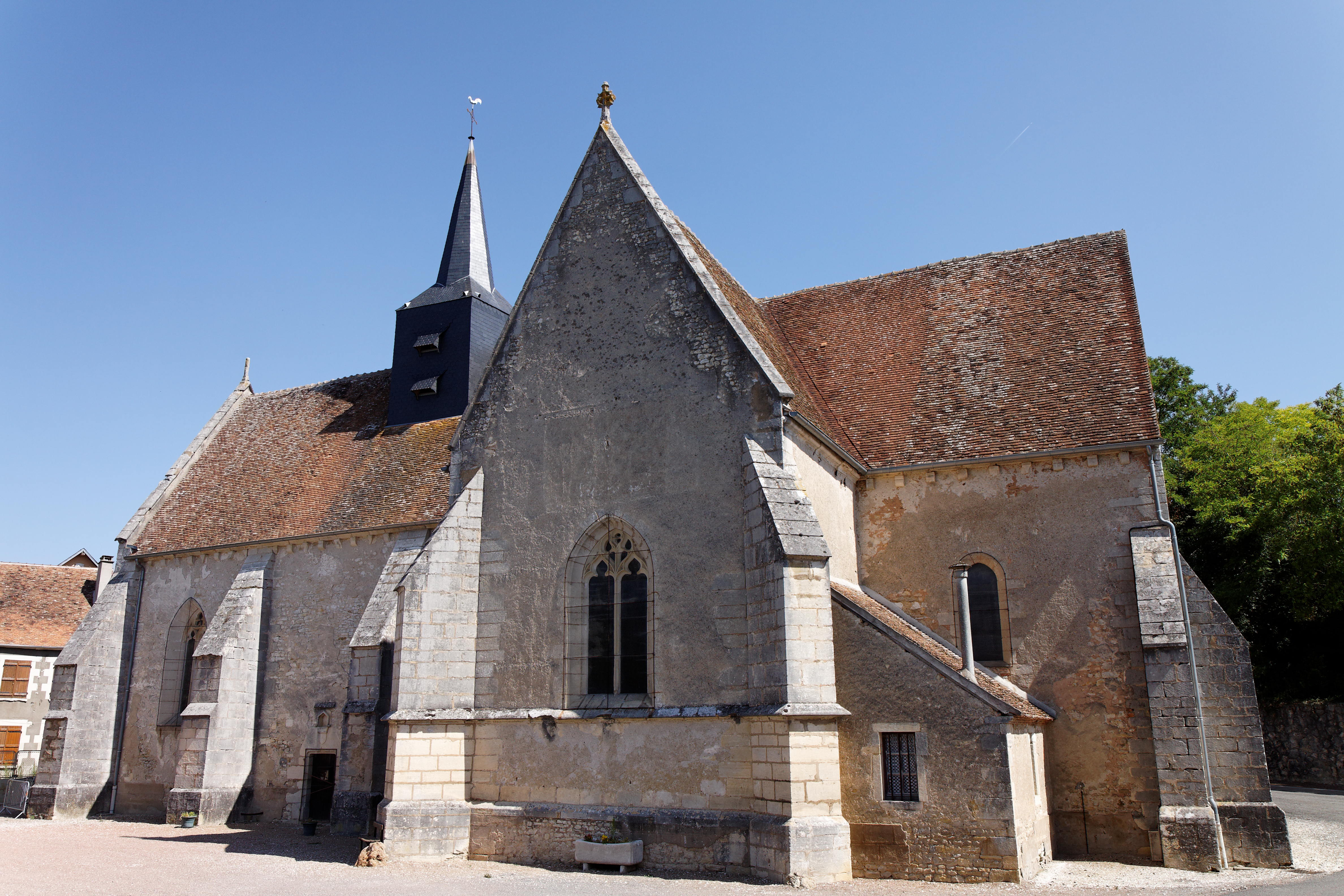 Eglise de la commune de Saint-Loup.